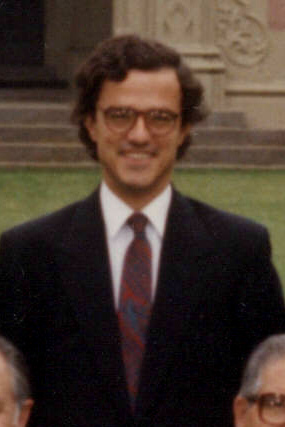 Fotografía del presidente Patricio Aylwin con su gabinete, entre otros: (sentados de izq. a der.) Juan Agustín Figueroa, ? , Alejandro Foxley, Patricio Rojas Saavedra, Enrique Krauss, Patricio Aylwin, Enrique Silva Cimma, Carlos Ominami, Ricardo Lagos, ?, ?. De pie (izq. a der.) ?, Sergio Molina Silva, Enrique Correa Ríos, ?, ?, René Cortázar Sanz, Juan Hamilton, Germán Correa Díaz, Edgardo Boeninger, Jaime Tohá González